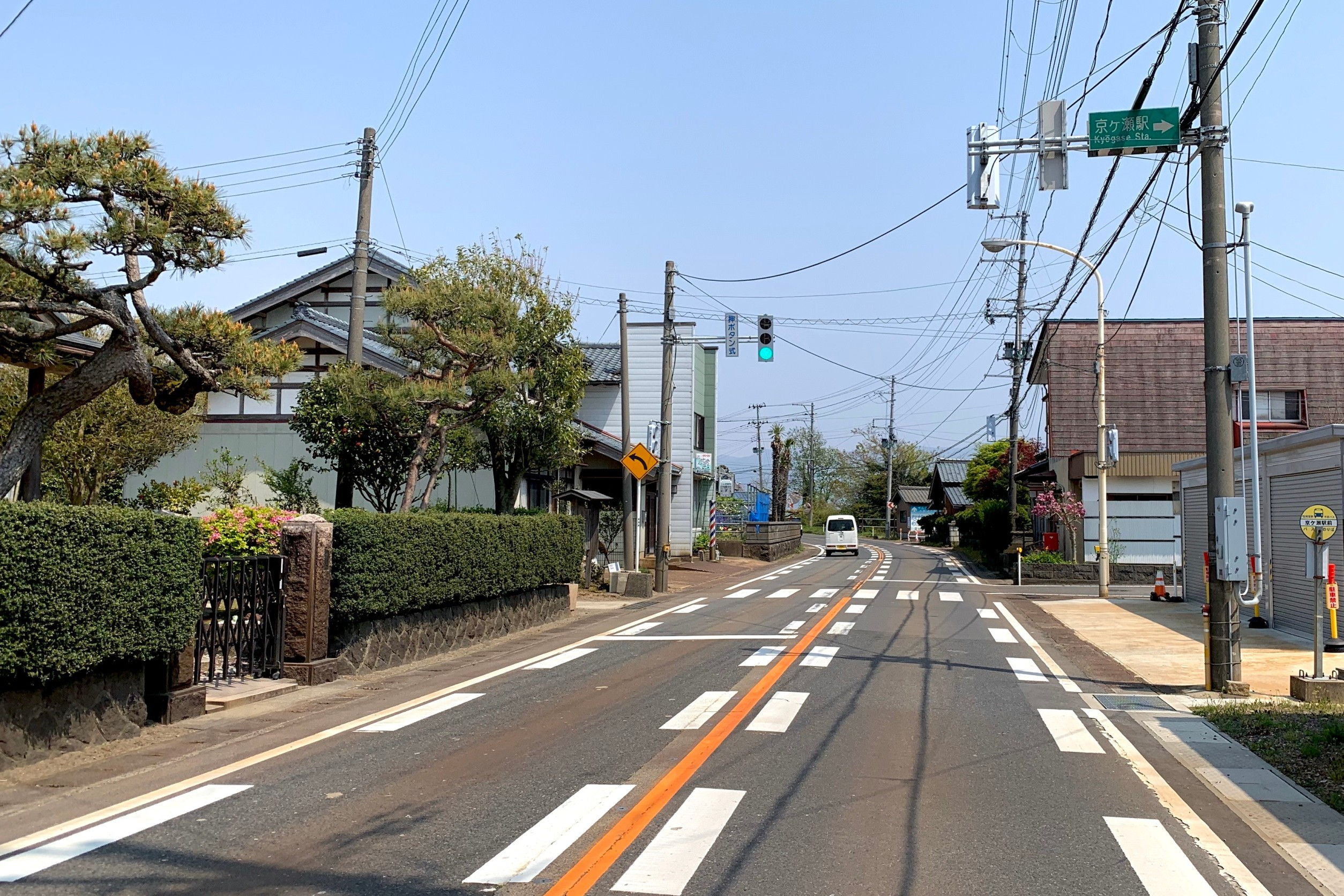 国道460号 京ケ瀬駅付近（新潟県阿賀野市，2020年5月）